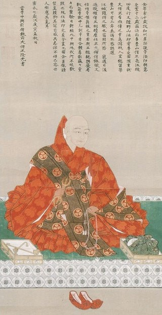 護持院隆光の頂相。